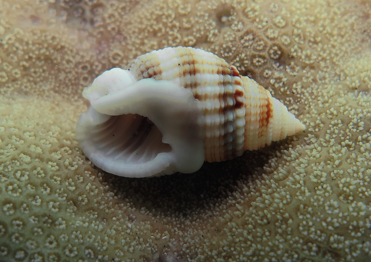 Nassarius gemmuliferus à la Réunion.